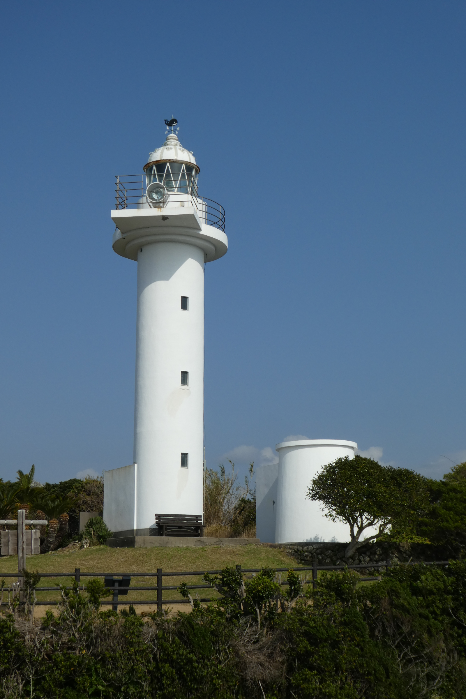 梶取埼灯台（和歌山県東牟婁郡太地町梶取崎）